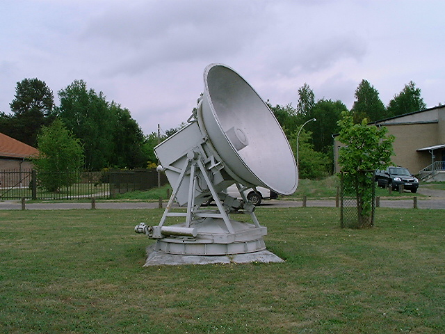 Motiv: Parabolspiegelantenne in Königswusterhausen. Mit 2,70m Durchmesser sie diente in der DDR zur erforschung neuer Frequenzbereiche, sowie des Streckendämpfungsverhaltens oberhalb 18 GHz.